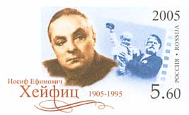 Почтовая марка России - Хейфиц Иосиф Ефимович